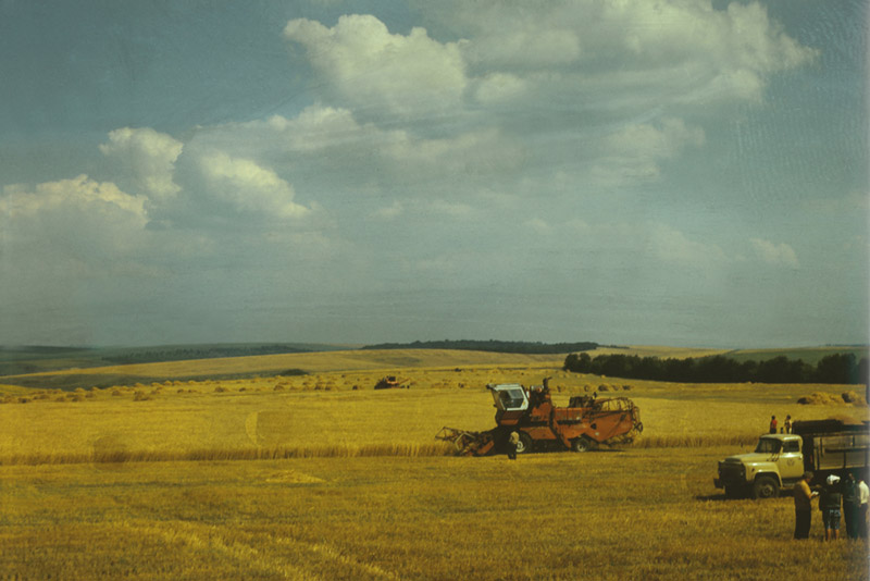 In Edinet district (1980).